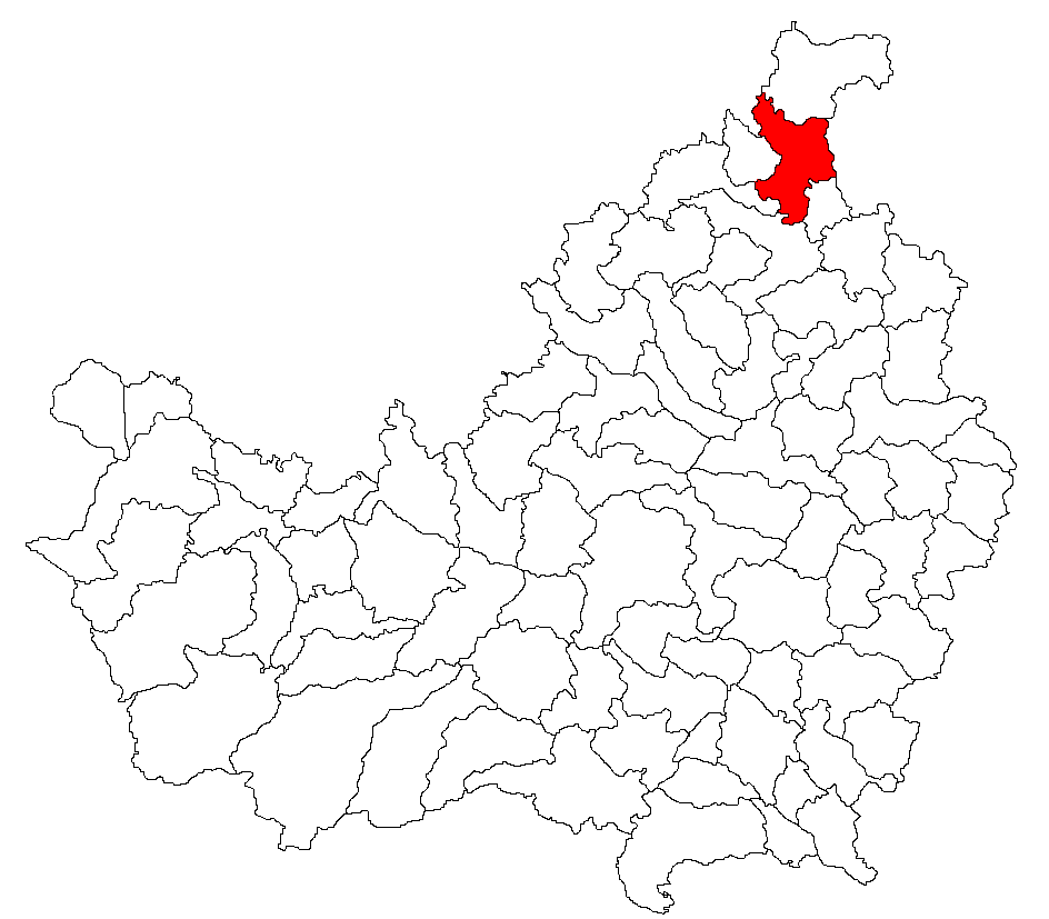 Categorie:Hărţi ale judeţului Cluj